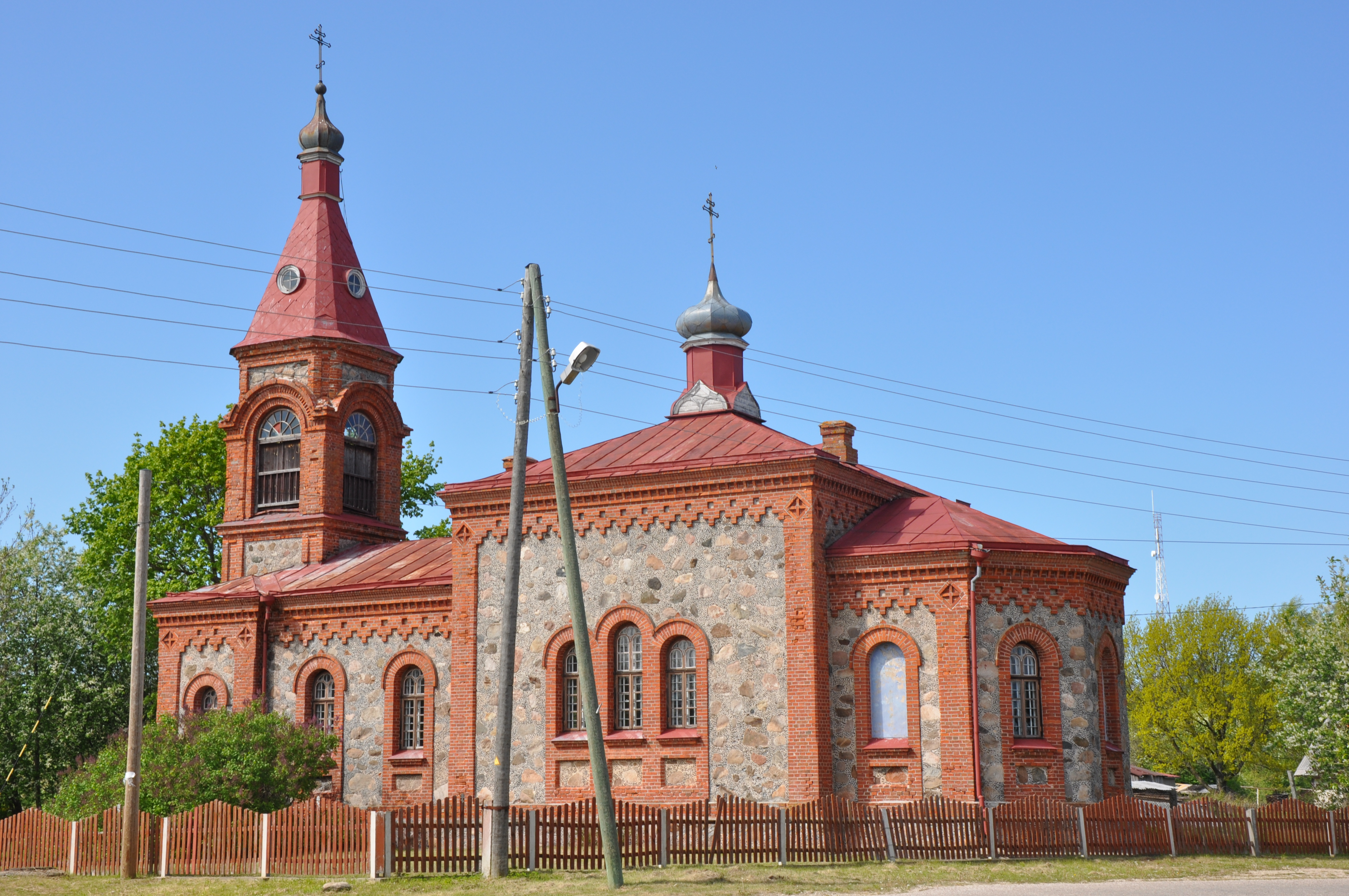 Kolkas Kristus Piedzimšanas baznīca, Kolkas pagasts, Dundagas novads, Latvia